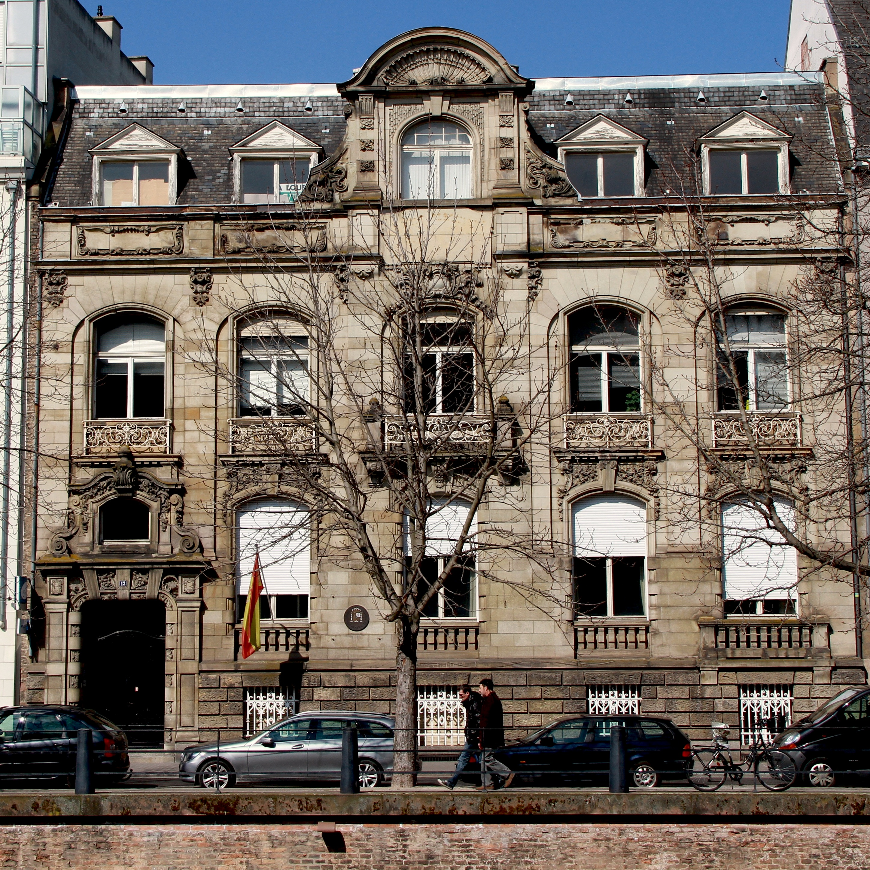 Strasbourg 13 quai Kléber